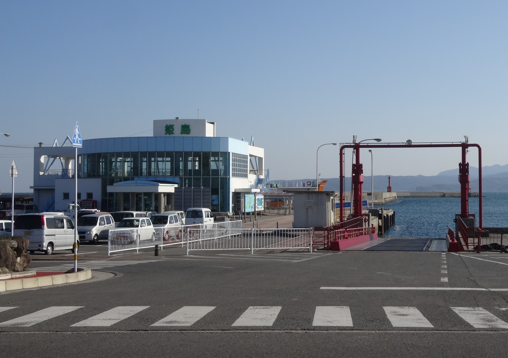 姫島港とフェリーターミナル